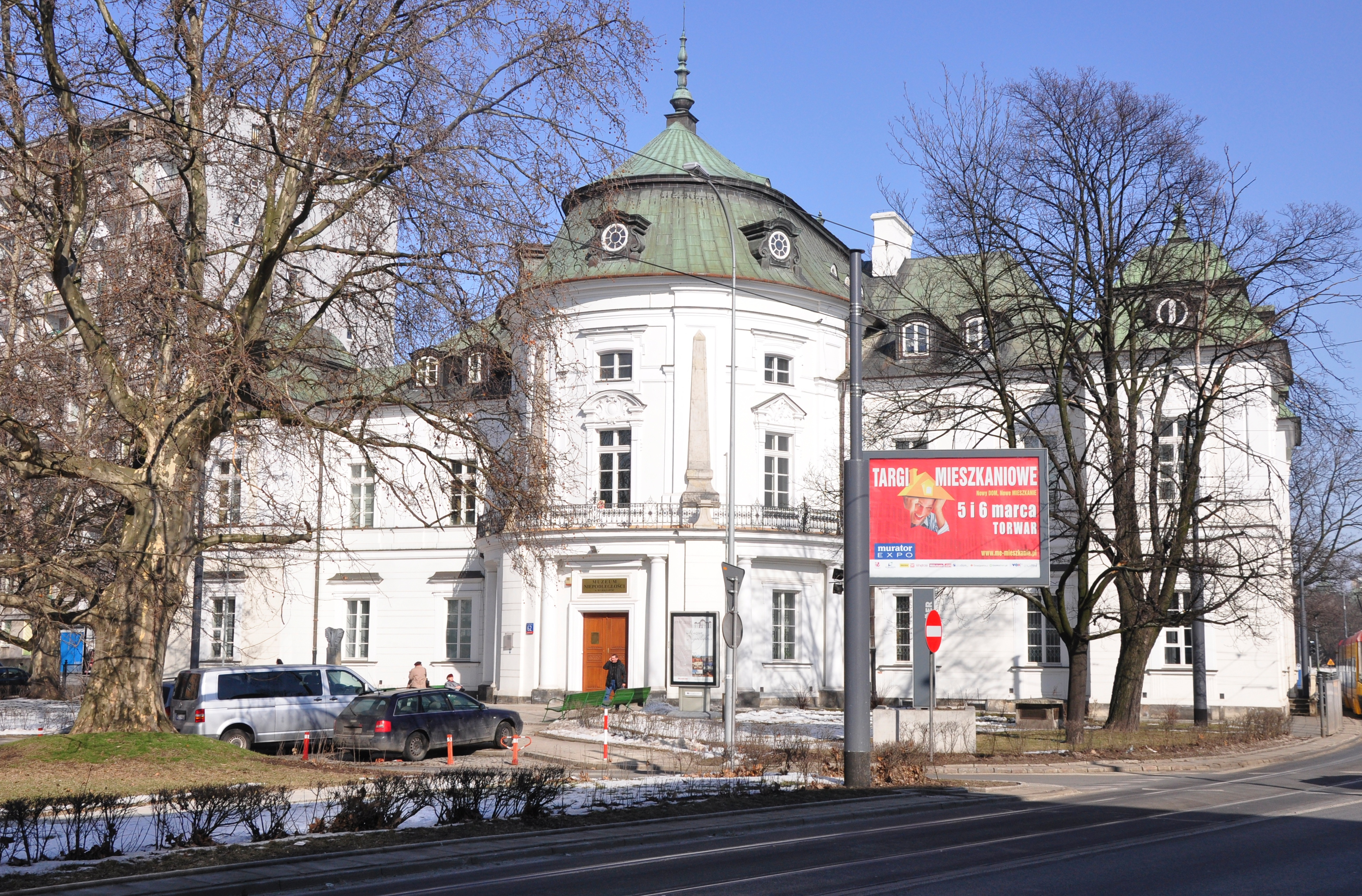 Unabhängigkeitsmuseum Warschau